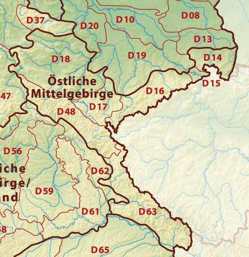 Haupteinheitengruppen der Östlichen Mittelgebirge